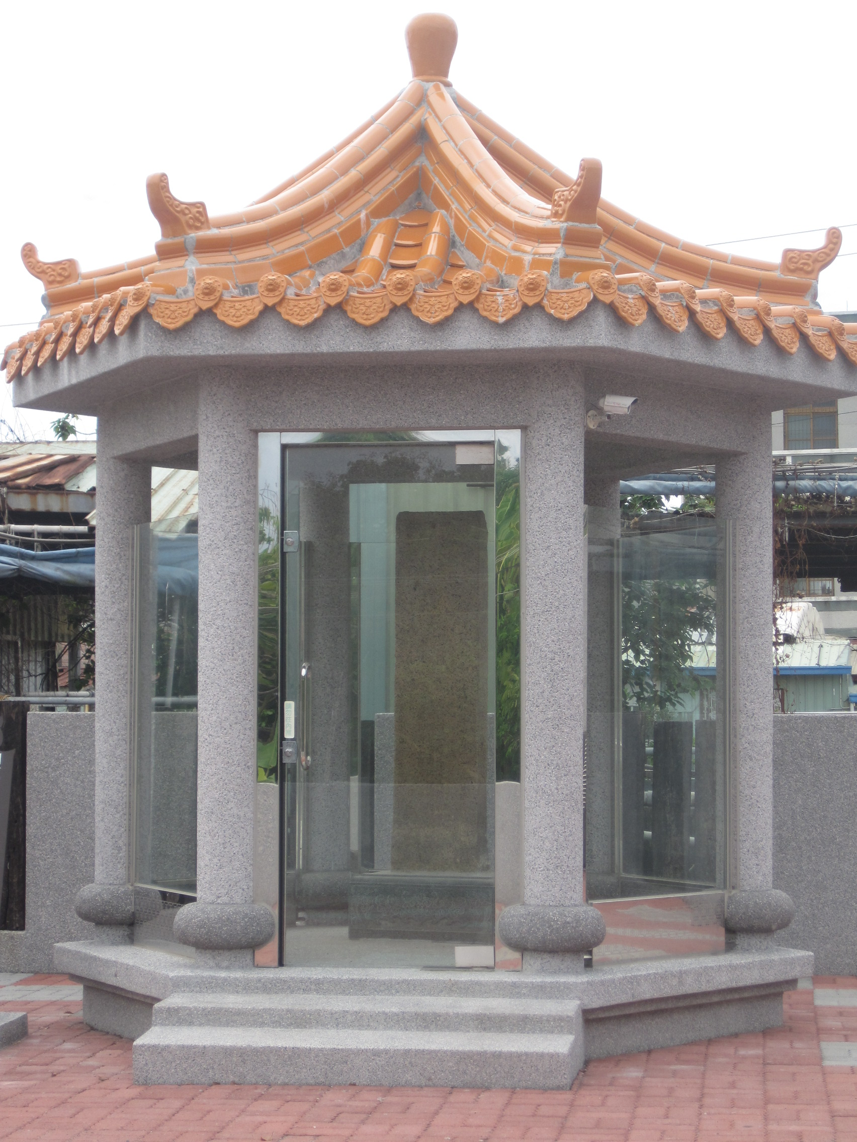 臺灣鳳山二縣定界碑與碑亭